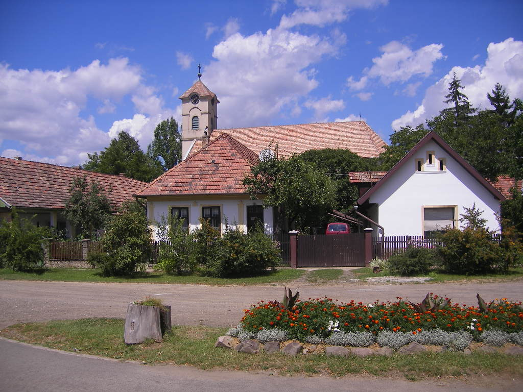 Nagybörzsöny - Hunyadi tér, háttérben az evangélikus templom This is a photo of a monument in Hungary. Identifier: 7144